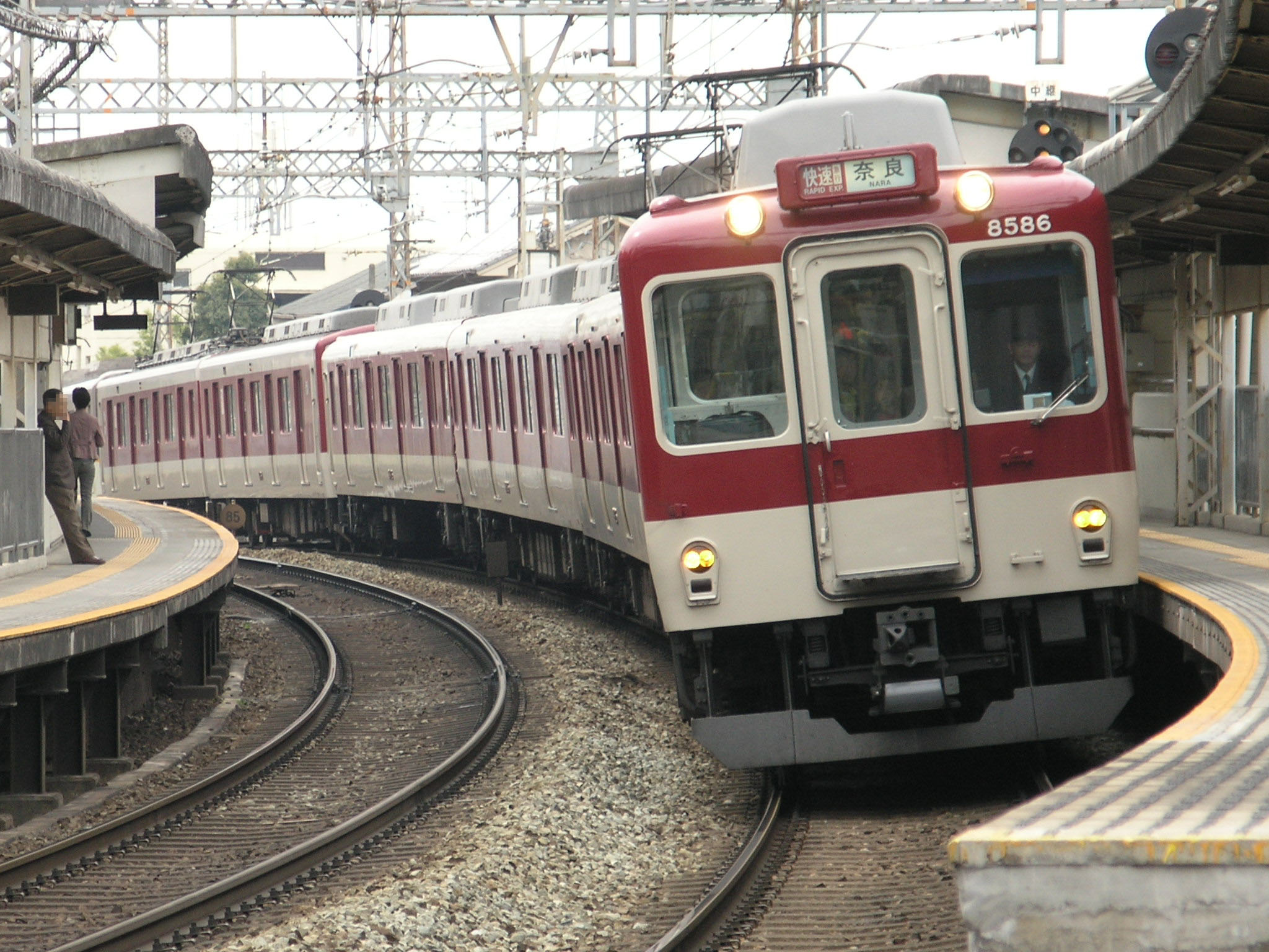 近鉄8000系電車